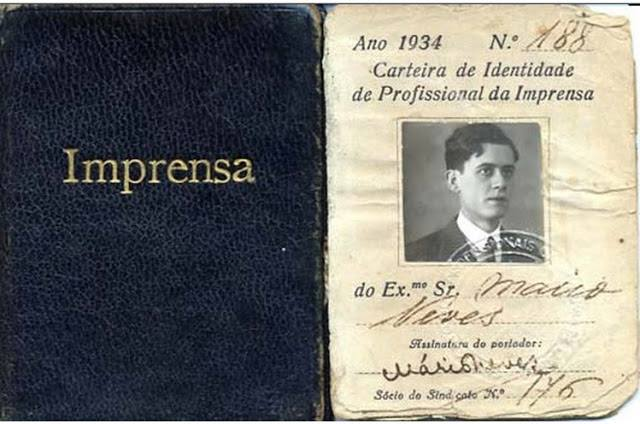 Carteira de Identidade de Profissional da Imprensa pertencente a Mario Neves.